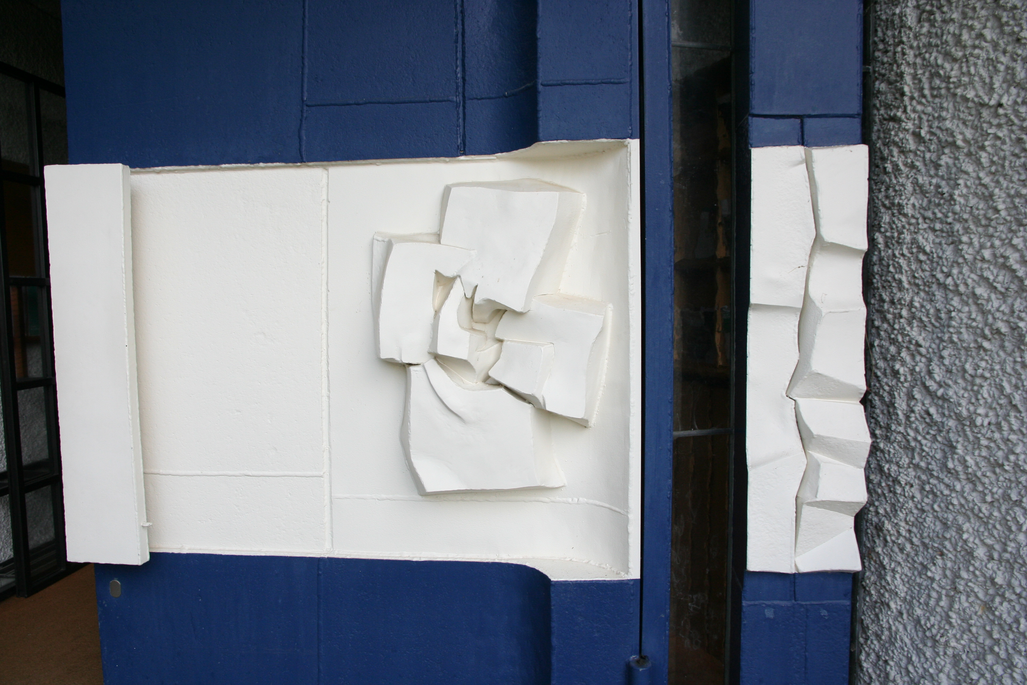 Katholische Kirche St. Maria in Müllheim TG